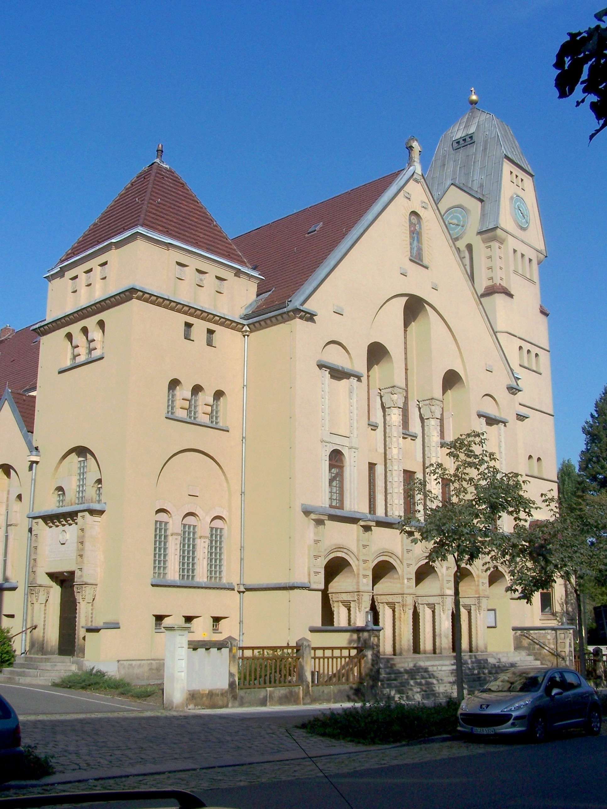 Katholische Josephskirche in Dresden-Pieschen